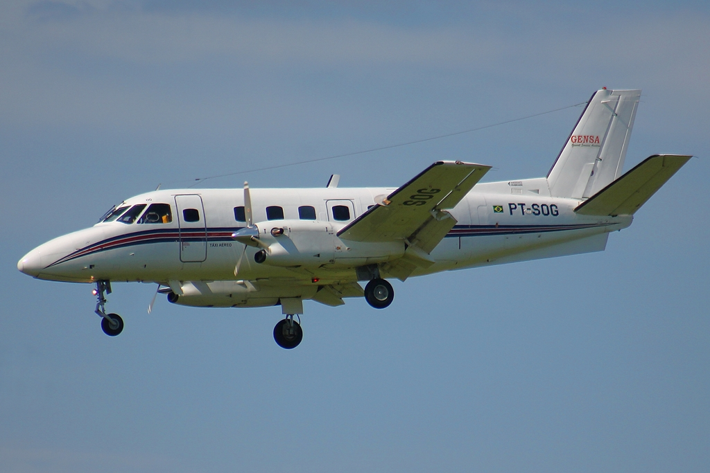 IMG_9016 (2)